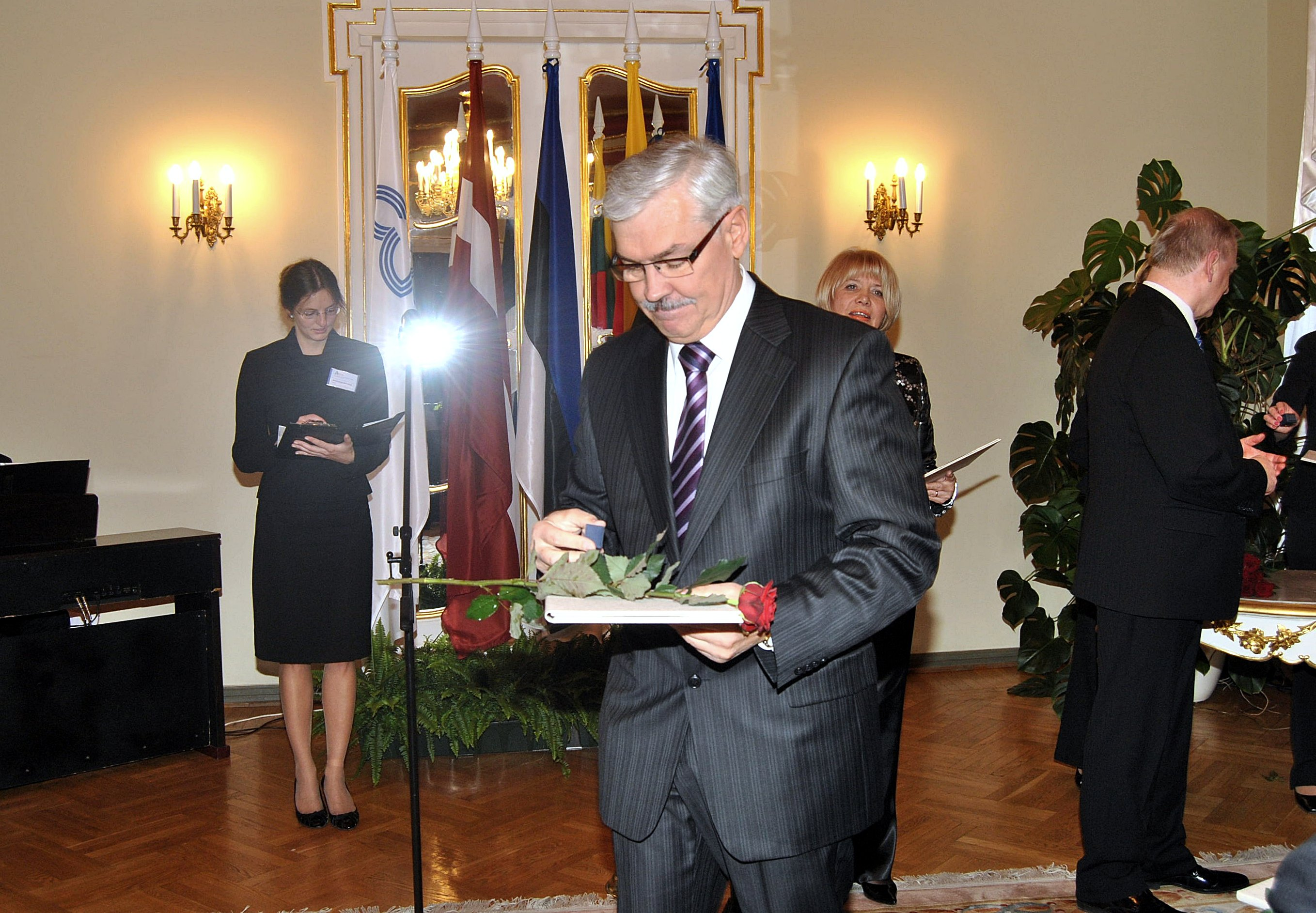 2010.gada 21.oktobris. Saeimas Baltajā zālē notiek Baltijas Asamblejas medaļu pasniegšanas ceremonija. Medaļu saņēmis Lietuvas parlamenta deputāts Zigmants Balčītis (Zigmantas Balčytis). Foto: Saeima